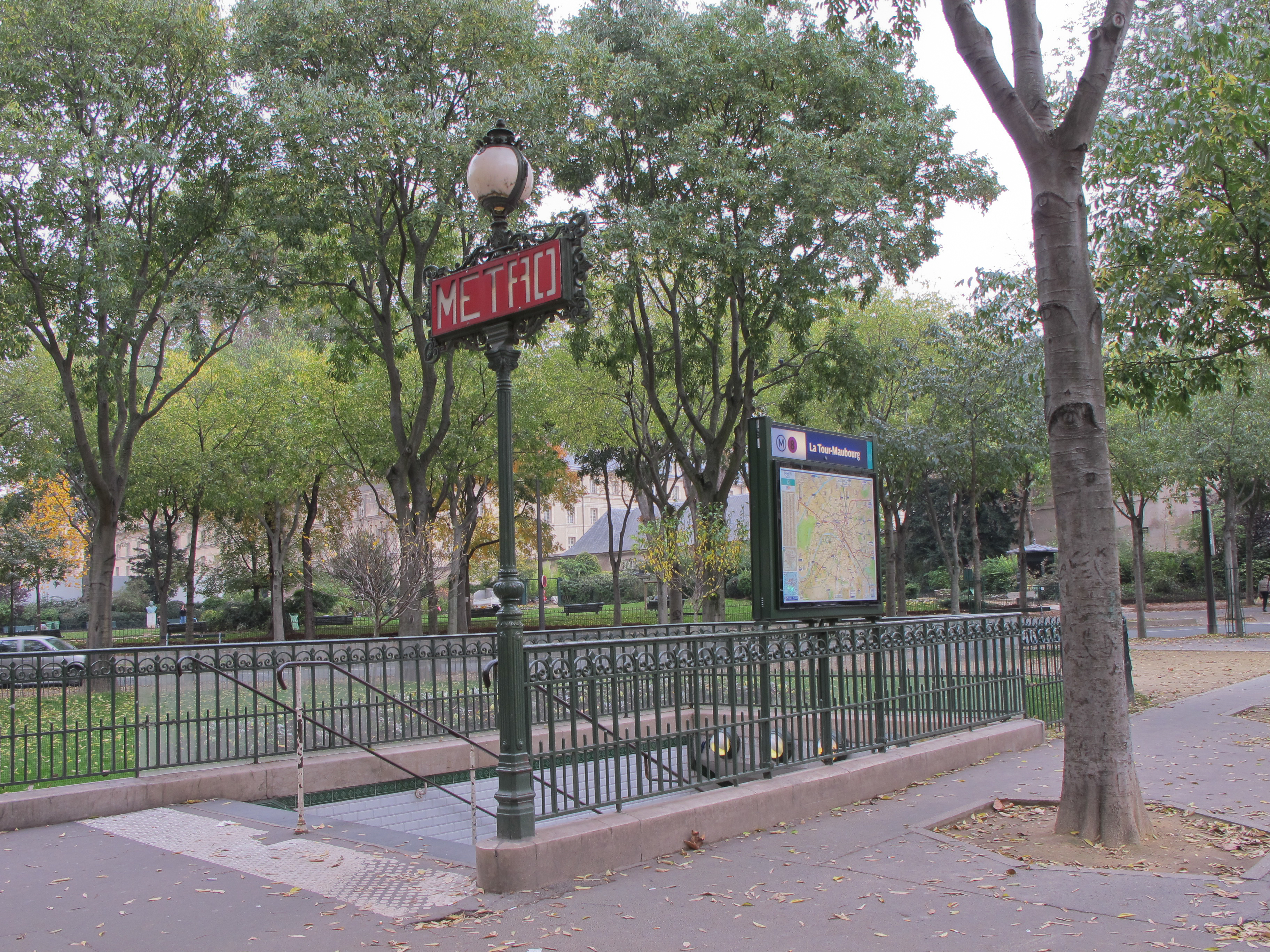 Station de métro La Tour Maubourg, métro de Paris, France